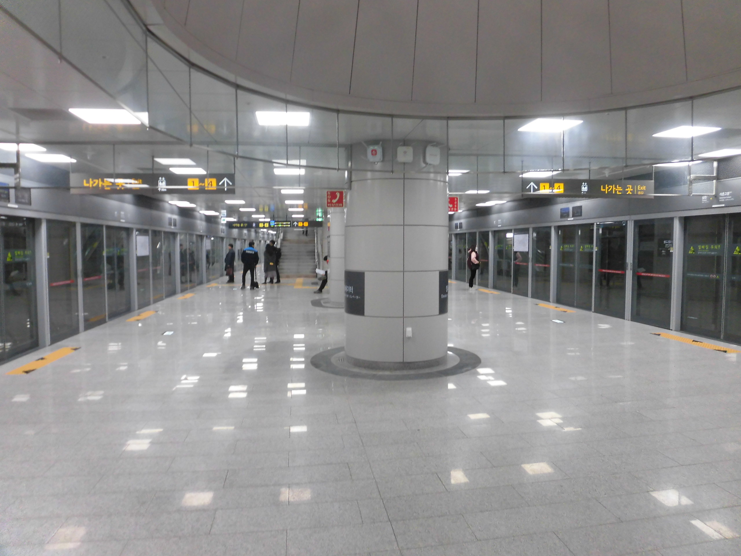 서울시 메트로 9호선 석촌고분역 홈